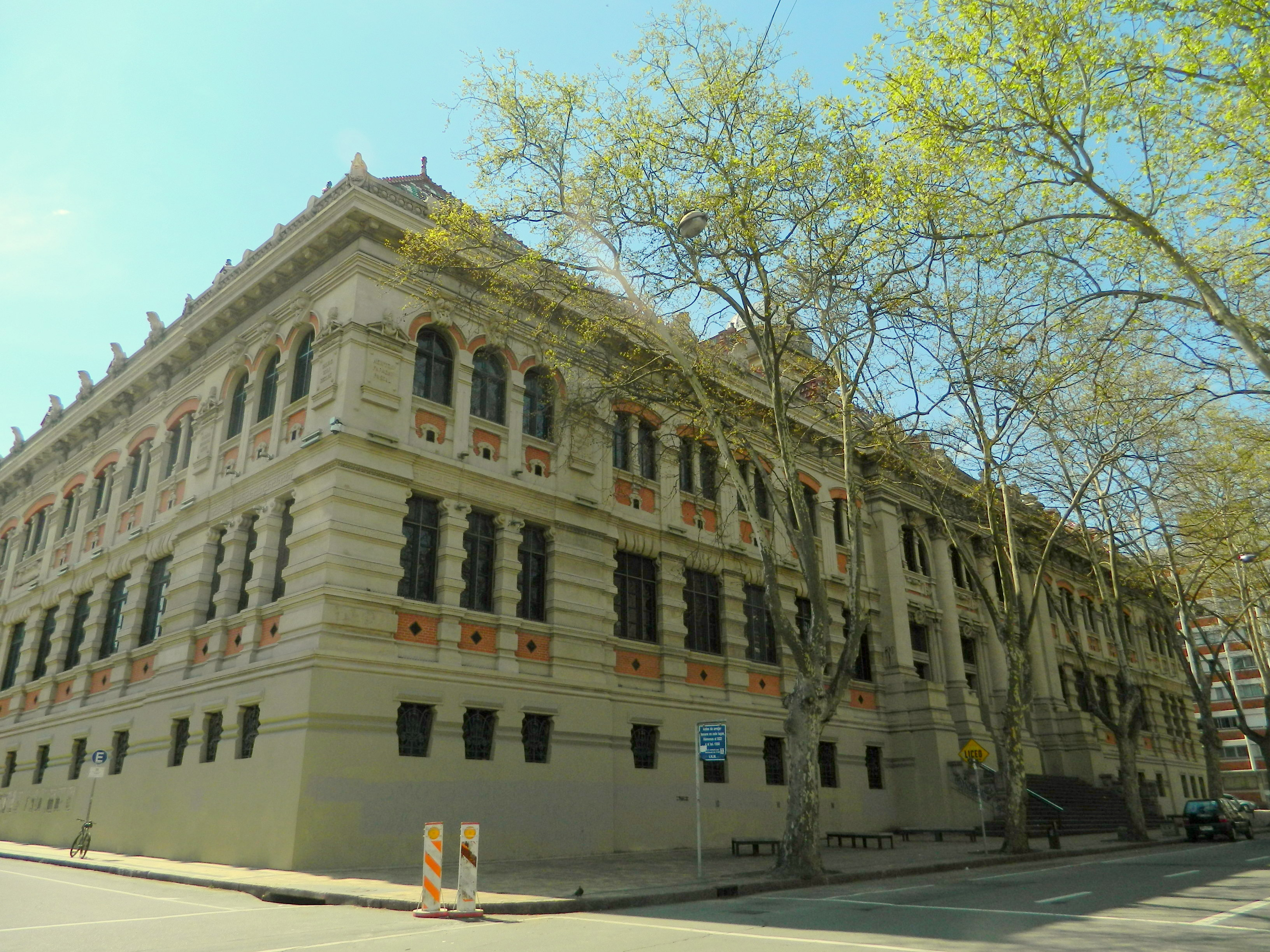 Instituto Alfredo Vásquez Acevedo (I.A.V.A.). Ubicada en el departamento de Montevideo